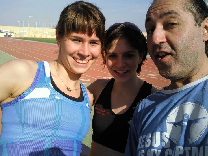 Carolin Nytra, Nadine Hildebrand und David Kadel im DLV-Trainingslager in Nikosia